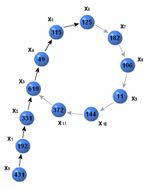 Das zyklische Verhalten des Pollard-Rho-Algorithmuses veranschaulicht dieses Bild.